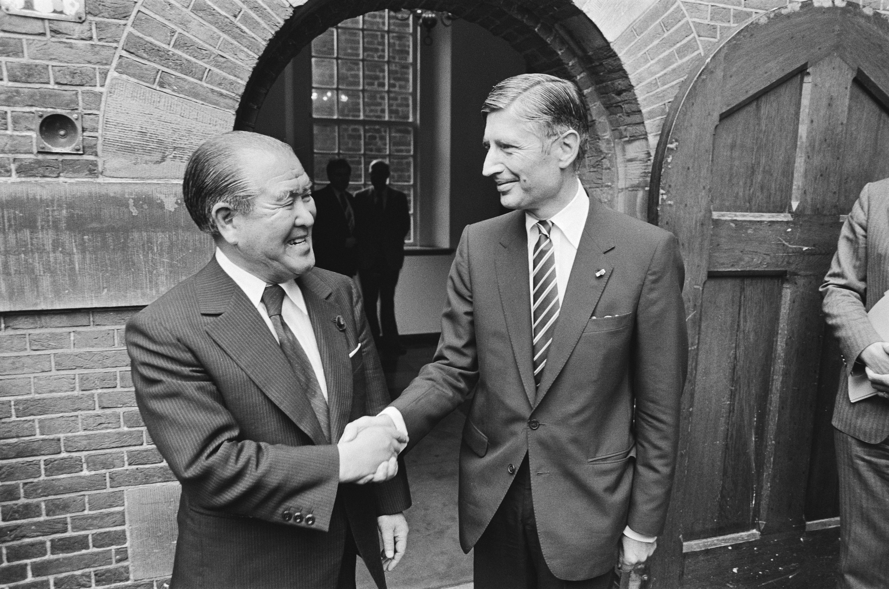 Collectie / Archief : Fotocollectie Anefo Reportage / Serie : [ onbekend ] Beschrijving : Japanse premier Suzuki in Nederland; Van Agt (r) begroet premier Suzuki op het Binnenhof Datum : 18 juni 1981 Trefwoorden : bezoeken Persoonsnaam : Suzuki, Zenko Fotograaf : Antonisse, Marcel / Anefo Auteursrechthebbende : Nationaal Archief Materiaalsoort : Negatief (zwart/wit) Nummer archiefinventaris : bekijk toegang 2.24.01.05 Bestanddeelnummer : 931-5512